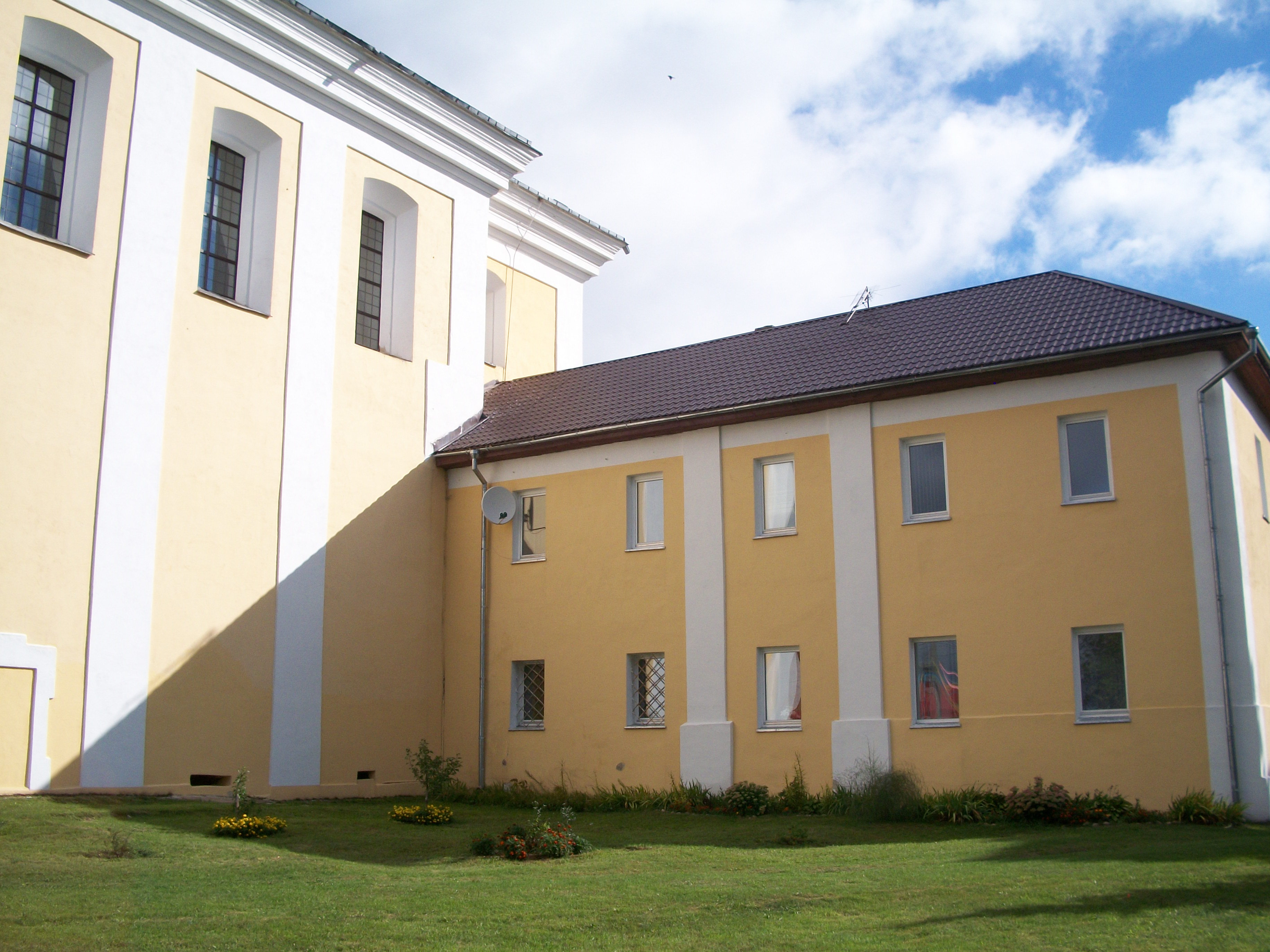 Беларуская (тарашкевіца): Комплекс былога кляштара трынітарыяў: касьцёл Сьв. апостала Андрэя кляштарны корпус. г.п. Крывічы This is a photo of Belarusian heritage monument. Reference number: 612Г000436 ( WLM)